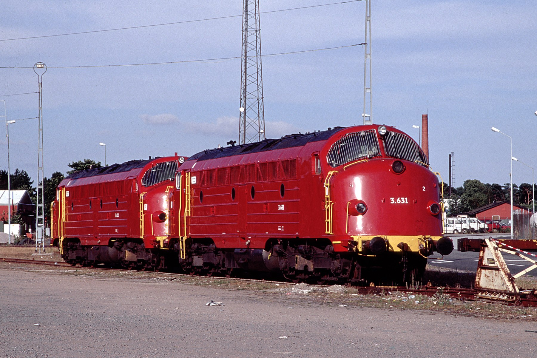 Norwegian State Railways Di3.631 and 622 at Ystad (Sweden) after being sold to an Italian company, ready for shipment to Poland and the railway network south of the Baltic sea.Norwegische Staatsbahnen Di3.631 und 622 im Hafen von Ystad (Schweden). Nach Verkauf an ein italienisches Unternehmen warten sie auf den Seetransport nach Polen und damit auf das Bahnnetz südlich der Ostsee.